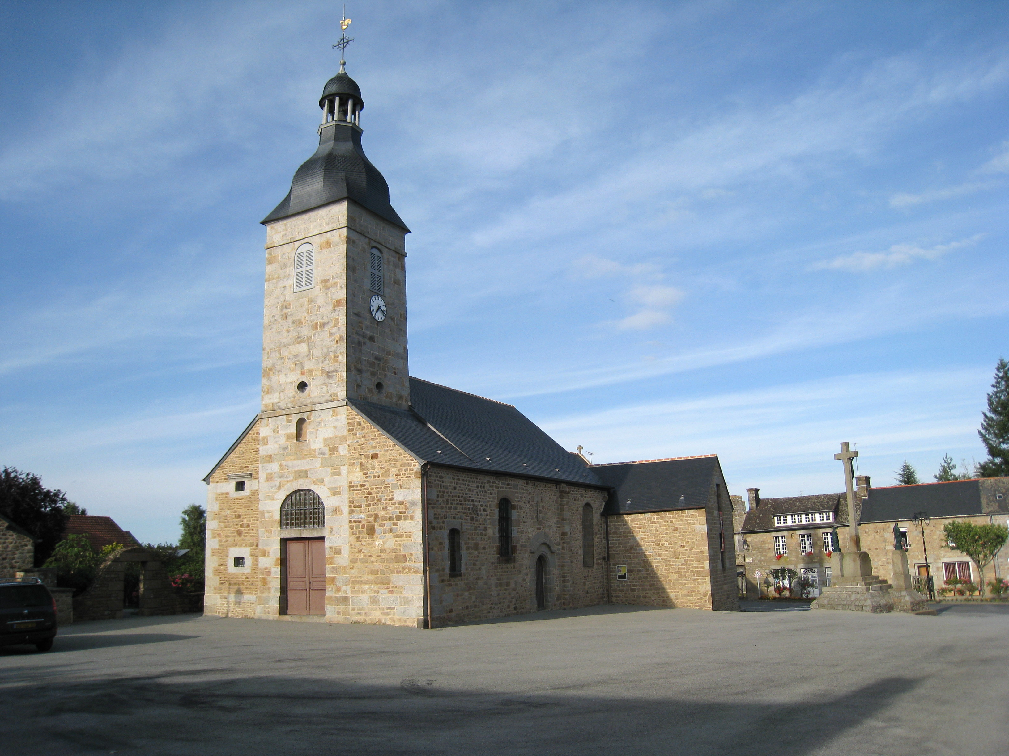 Eglise Saint-Martin de Baillé, Ille et Vilaine, France